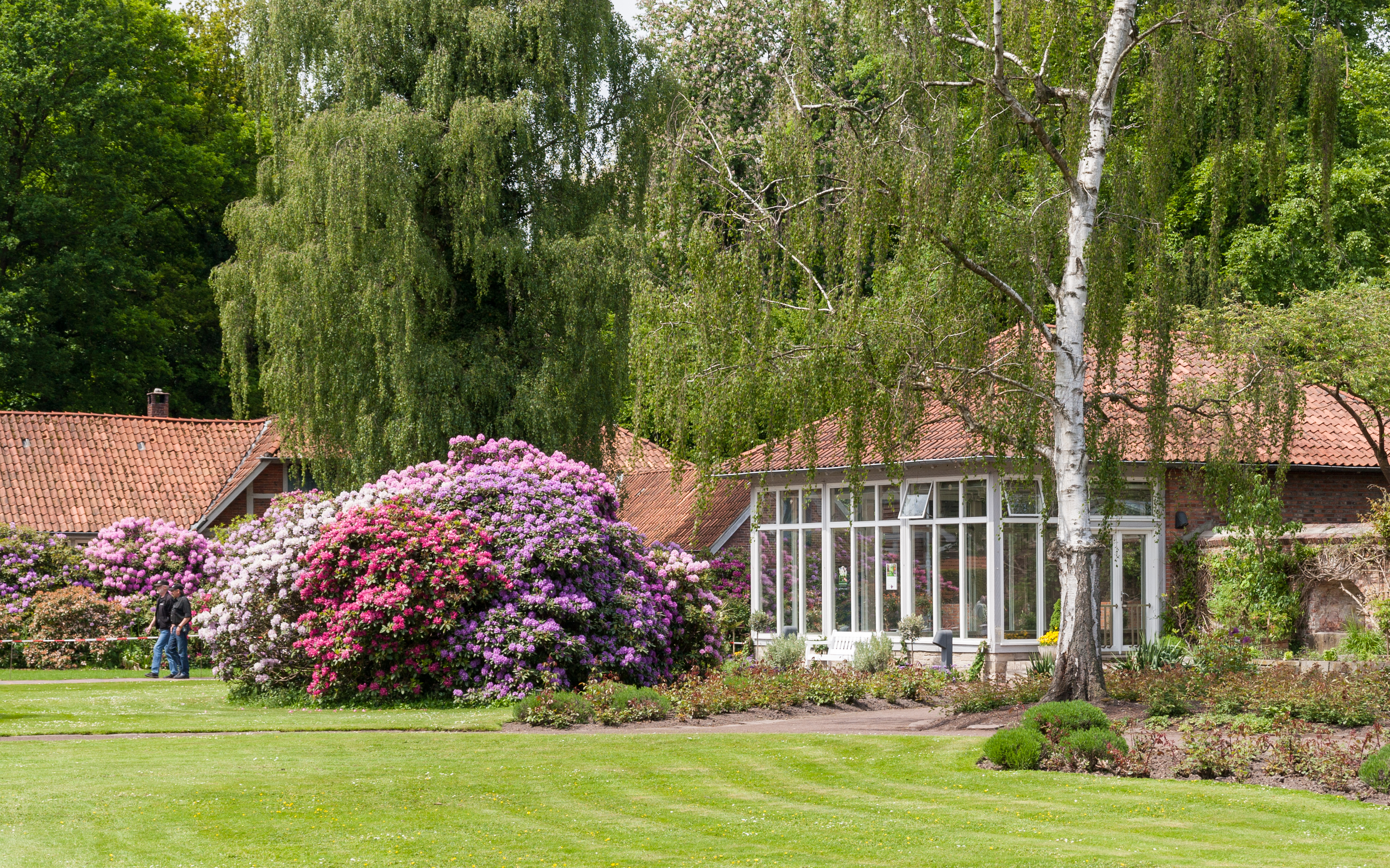 Rhododendronblüte im Schlossgarten Oldenburg (Oldb), Mai 2010